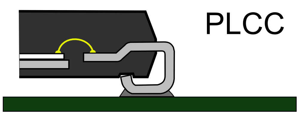 足部分の側面断面図. PLCC 拡大断面図 四方に端子が出る.